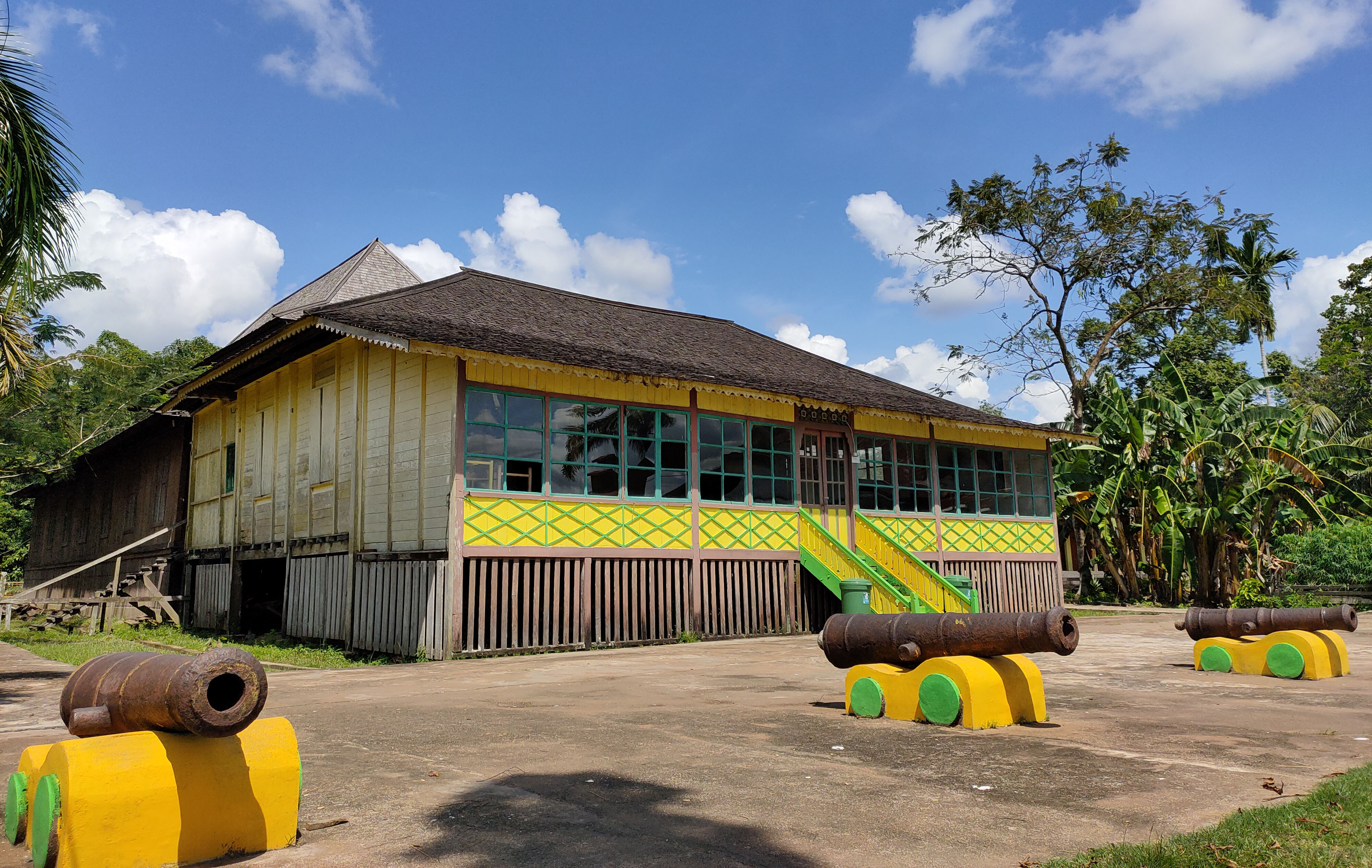 Keraton Tayan terletak di Desa Pedalaman, Kecamatan Tayan Hilir, Kabupaten Sanggau, Kalimantan Barat.